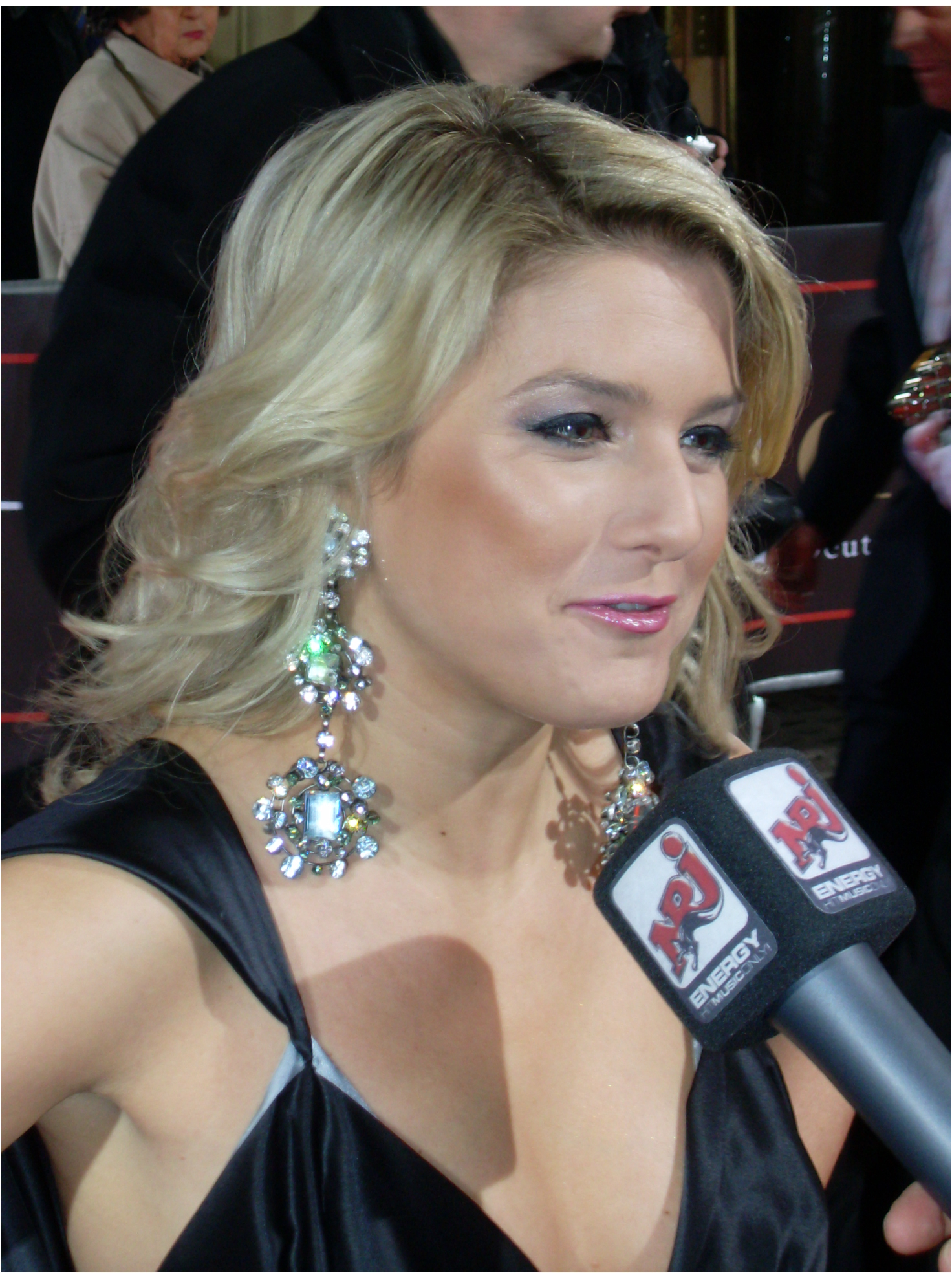 Jeanette Biedermann at Diva 2008